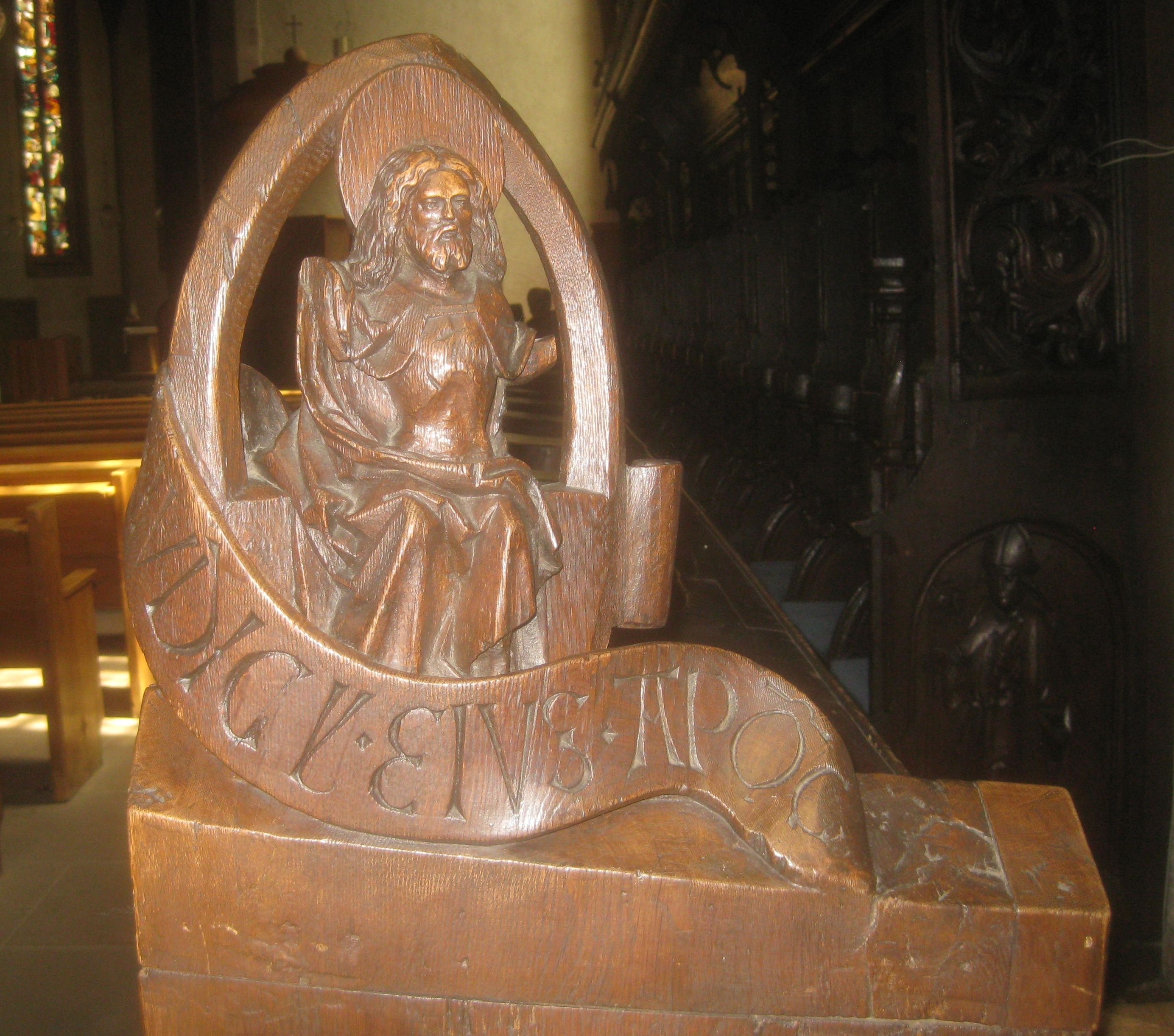 Chorgestühl der Leonhardskirche, rechte Abschlusswange der vorderen Sitzreihe an der Südostfassade, Aufsatzfigur von Christus in der Mandorla als Weltrichter.